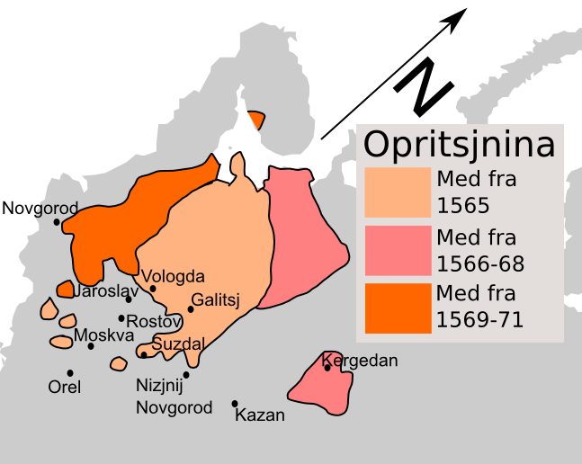 Russland under opritsjnina 1565-72